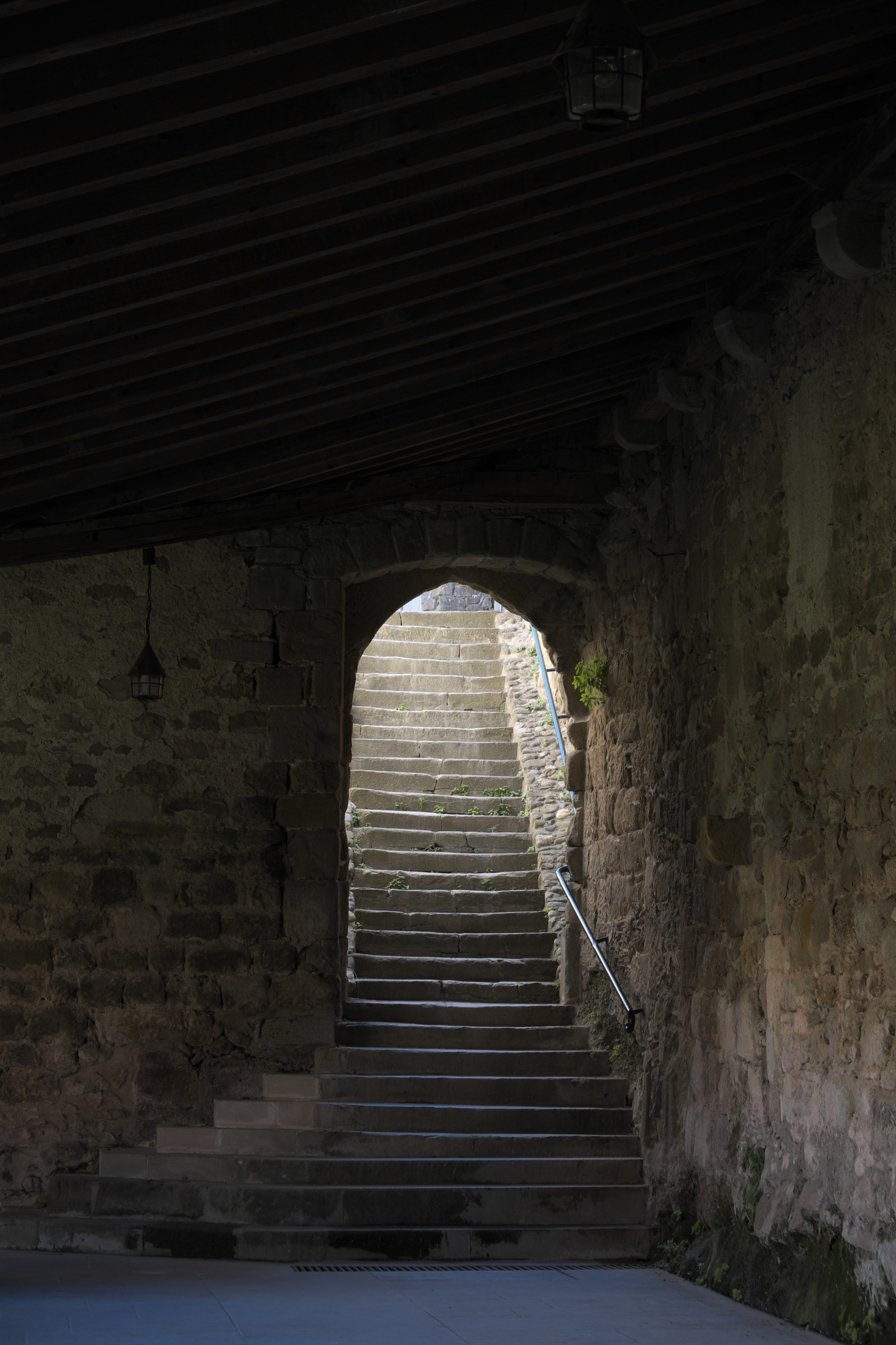 Ehemalige Abtei Saint-Hilaire in Saint-Hilaire im Département Aude (Region Languedoc-Roussillon/Frankreich), Treppe vom Kreuzgang zum Vorratsspeicher